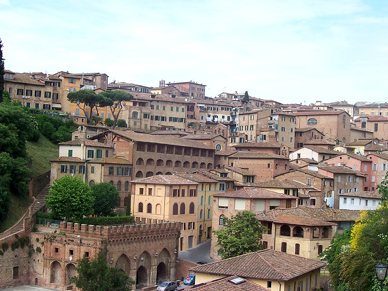 Siena - Panorama con la Fonte Branda